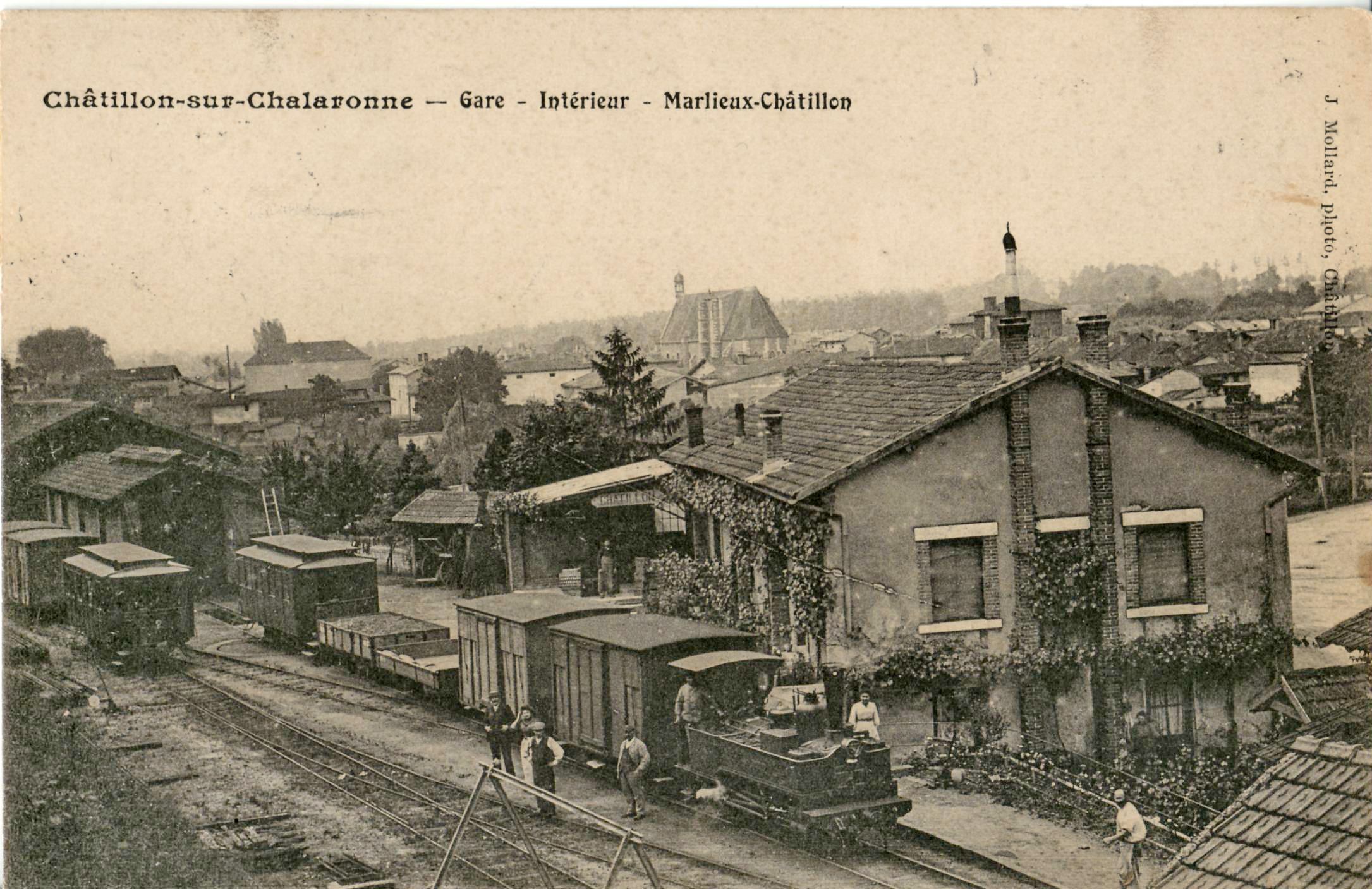 Carte postale ancienne éditée par Mollard : CHÂTILLON-SUR-CHALARONNE - Gare - Intérieur - Marlieux-Châtillon